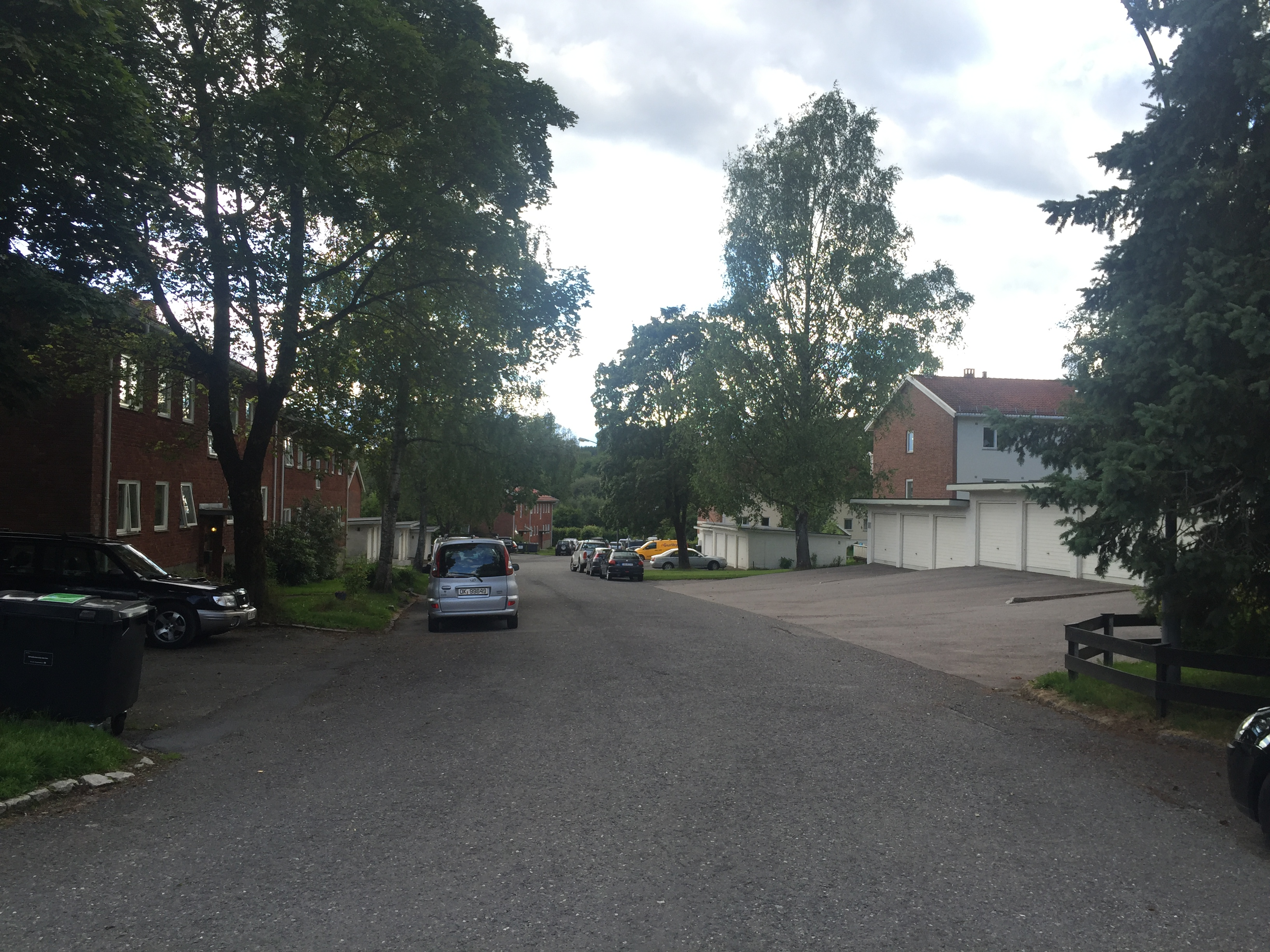 Golfstubben i Oslo.